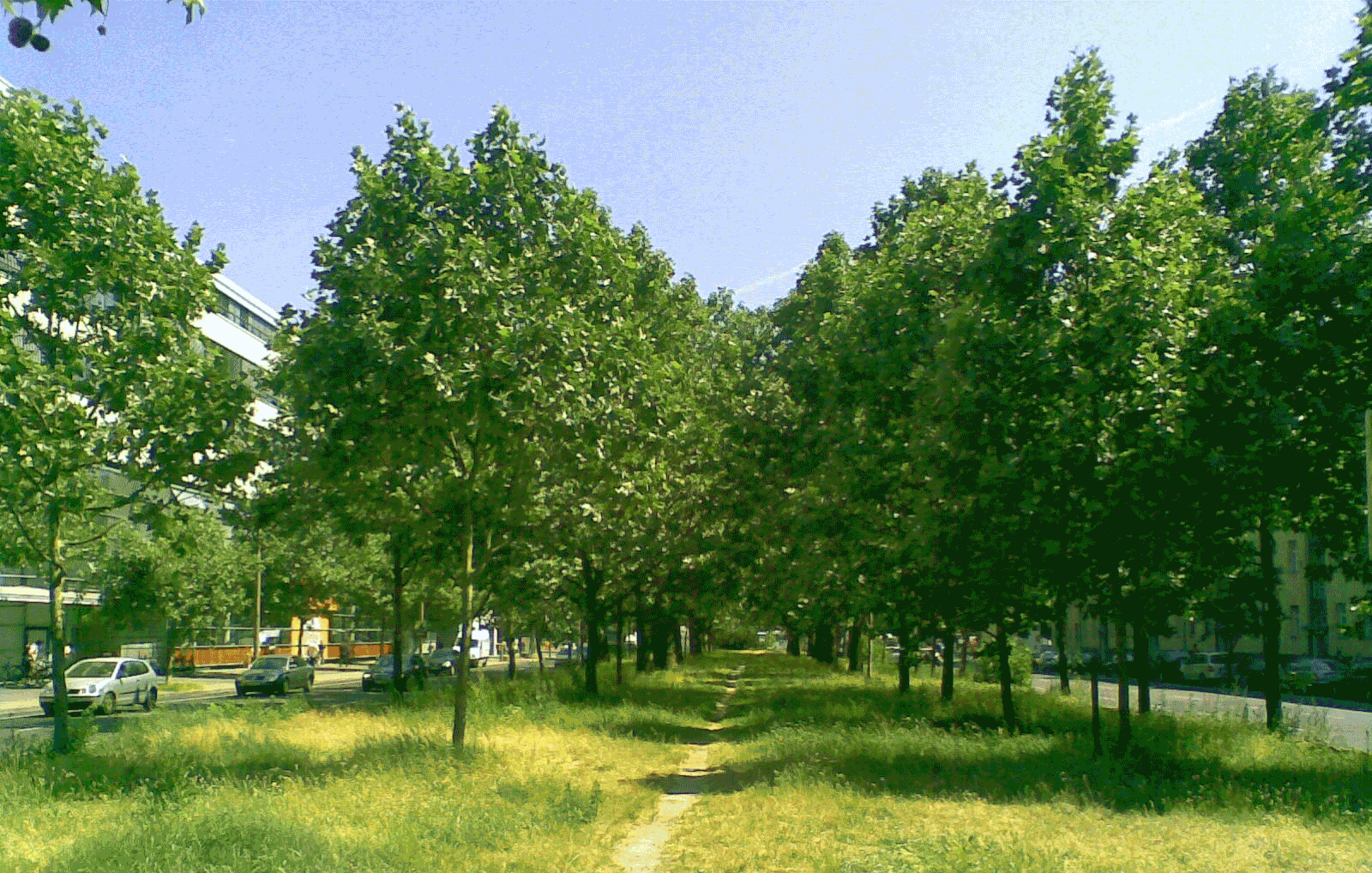 Die Mittelpromenade ist auf dem gesamten Ring von der Seestraße bis zur Kniprodestraße vorhanden, durch starken Verkehr ist es kein Boulevard oder Platz zur Erholung geworden.